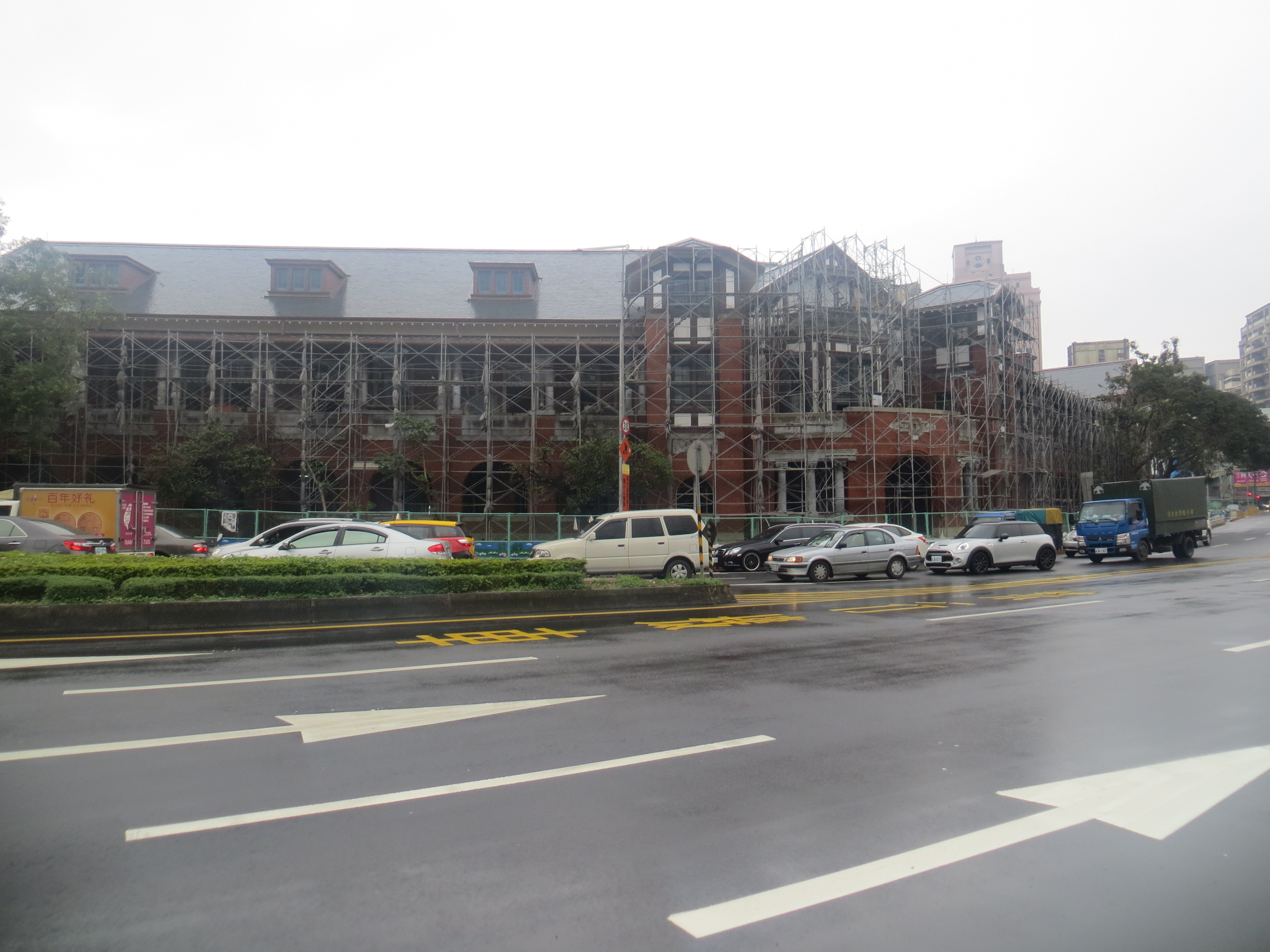 在經過多日重修後，至2016年1月28日台灣鐵道部舊大樓的情況，外觀已修復達九成。